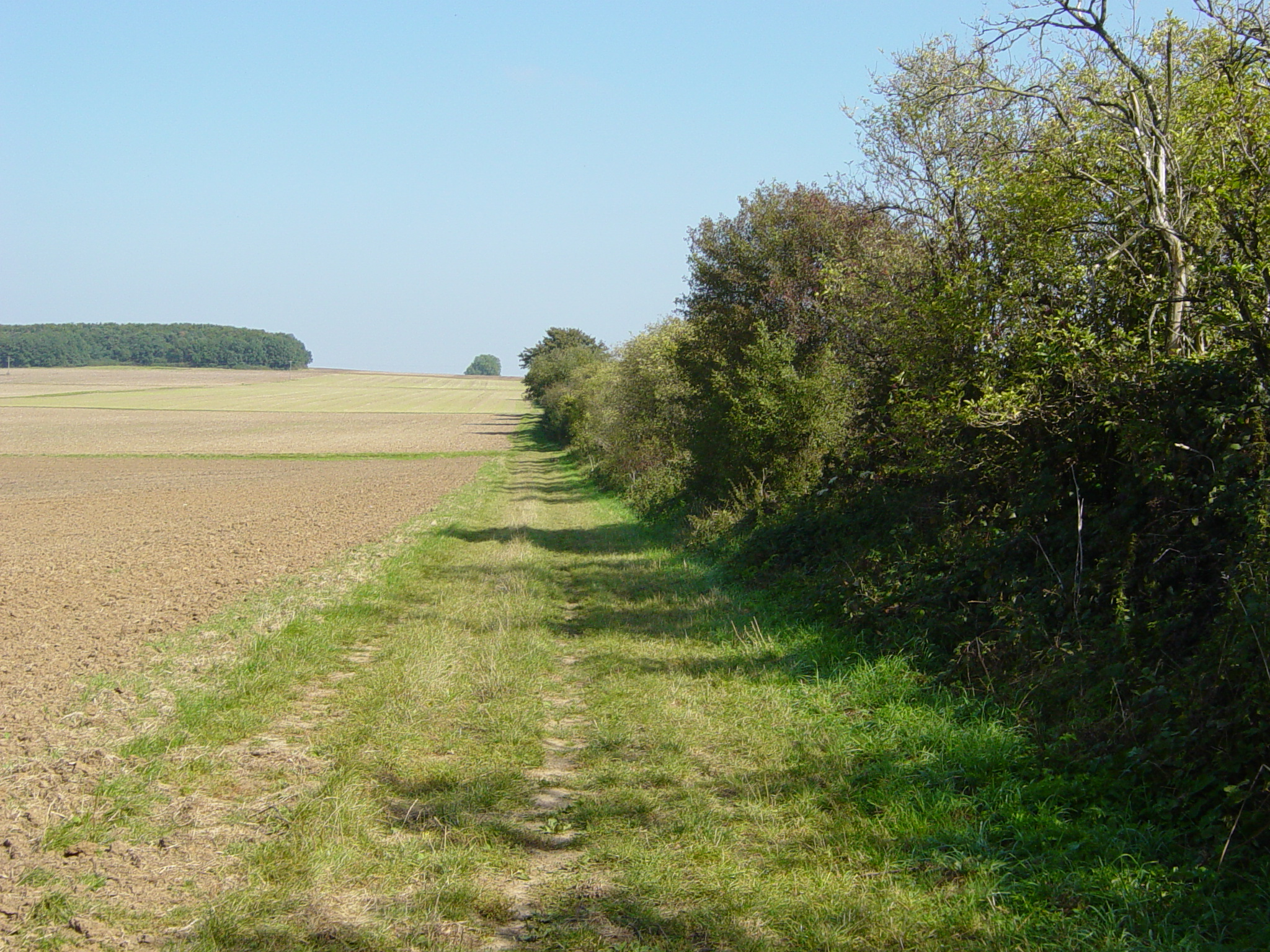 Baum- und Buschstreifen am Limes westlich von Grüningen zwischen WP 4-47 und WP 4-49, Blick jenseits des Limes nach Nordost